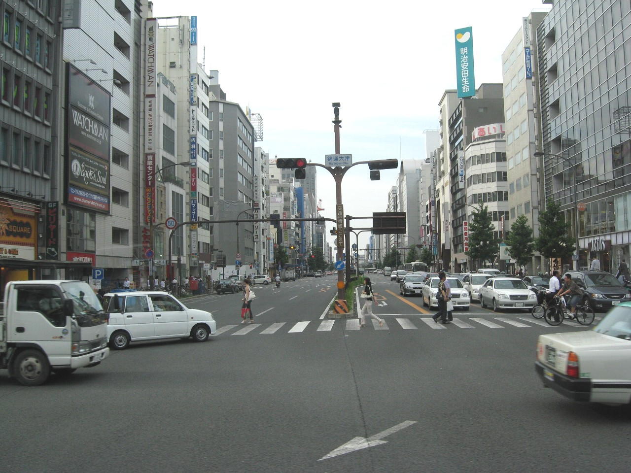 Otsu-dori(Avenue) in Nagoya, Japan（名古屋市の大津通）